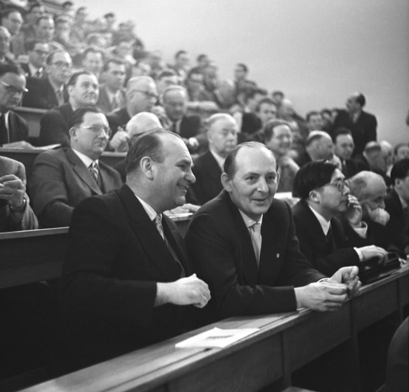 Zentralbild/Leipzig 27.4.1958 Tagung der Physikalischen Gesellschaft im Physikalischen Institut der Karl-Marx-Universität Leipzig Die Hauptjahrestagung der Physikalischen Gesellschaft in der DDR begann am 27.4.1958 in Leipzig im Physikalischen Institut der Karl-Marx-Universität, an der zahlreiche namhafte Wissenschaftler aus dem Ausland und aus Westdeutschland teilnehmen. UBz: Leninpreisträger Prof. Barwich (links) im Gespräch mit Prof. Dr. Havemann von der Humboldt-Universität Berlin.